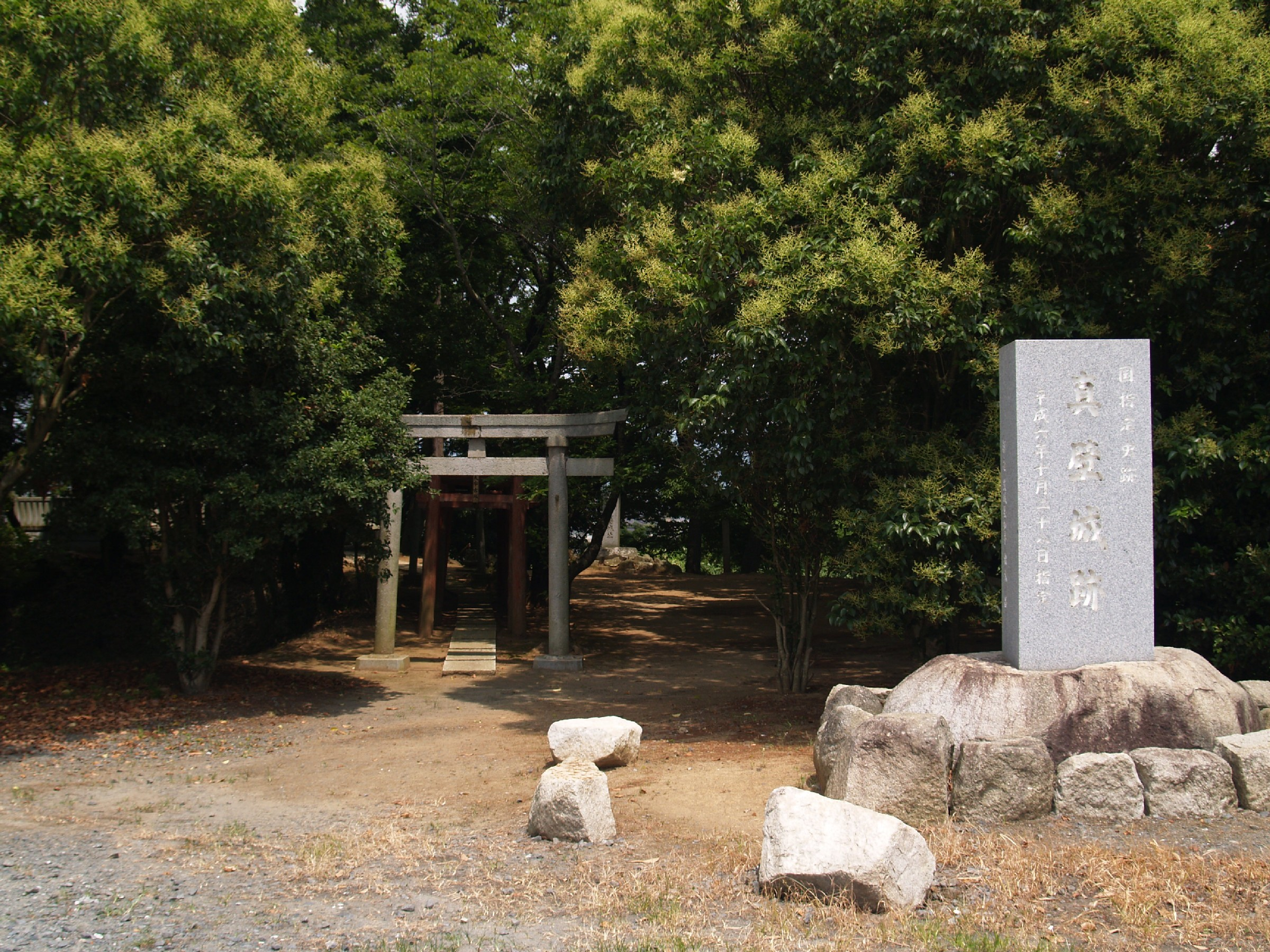 真壁城跡の碑